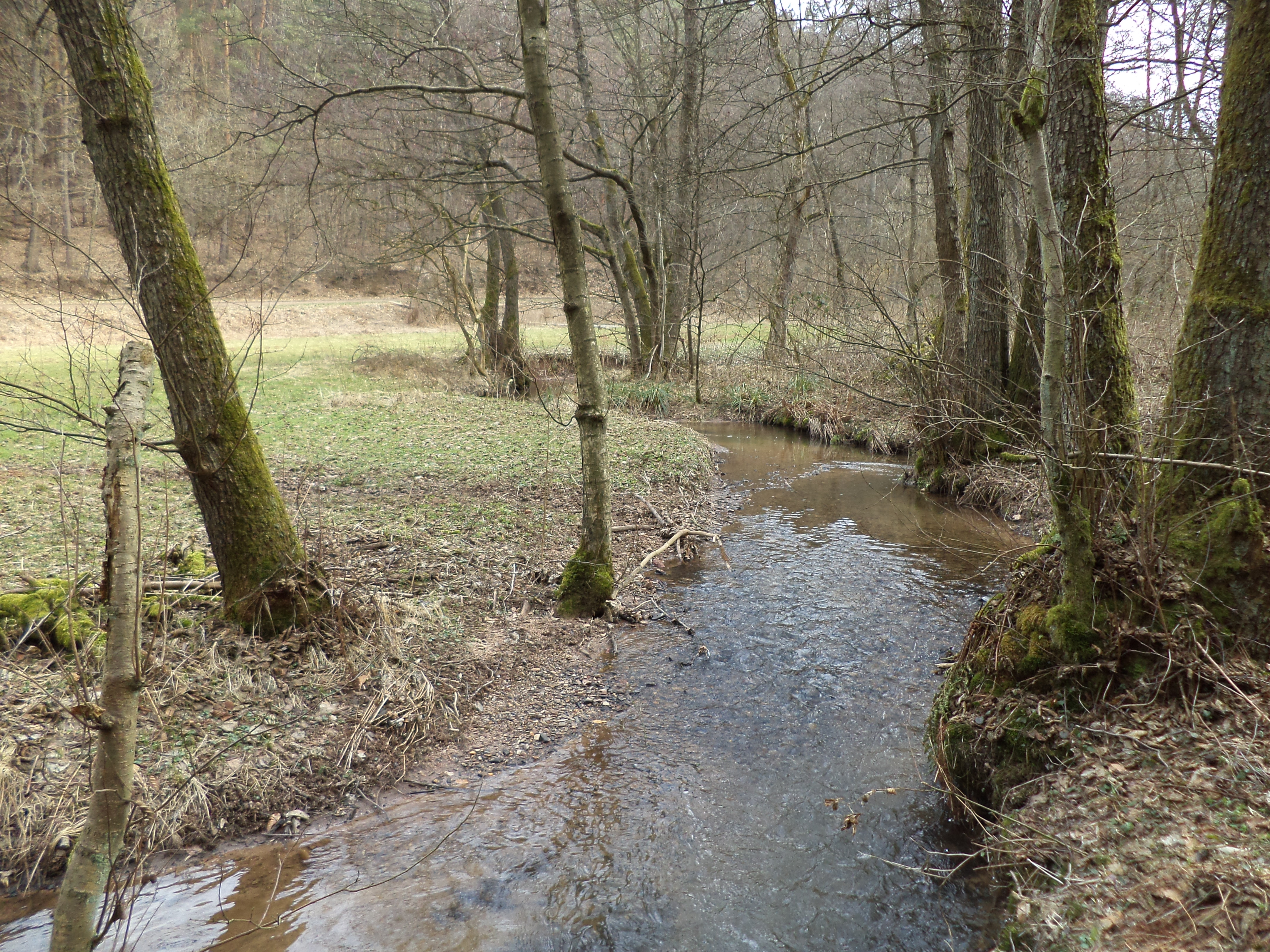 Der Näßlichbach, der Oberlauf des Birkigbachs, östlich von Horbach